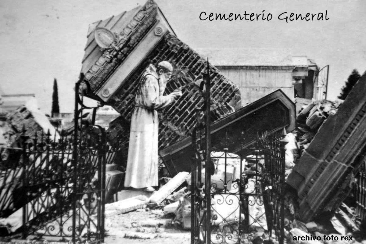 Efectos del Terremoto de 1917-18 en la Ciudad de Guatemala